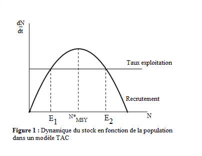 Description de la densité des stocks